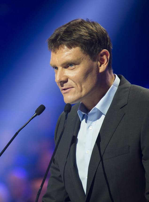 Arena Ursynów / Warszawa, Konwencja PO RP, 20.06.2015, fot. Ewelina Lach